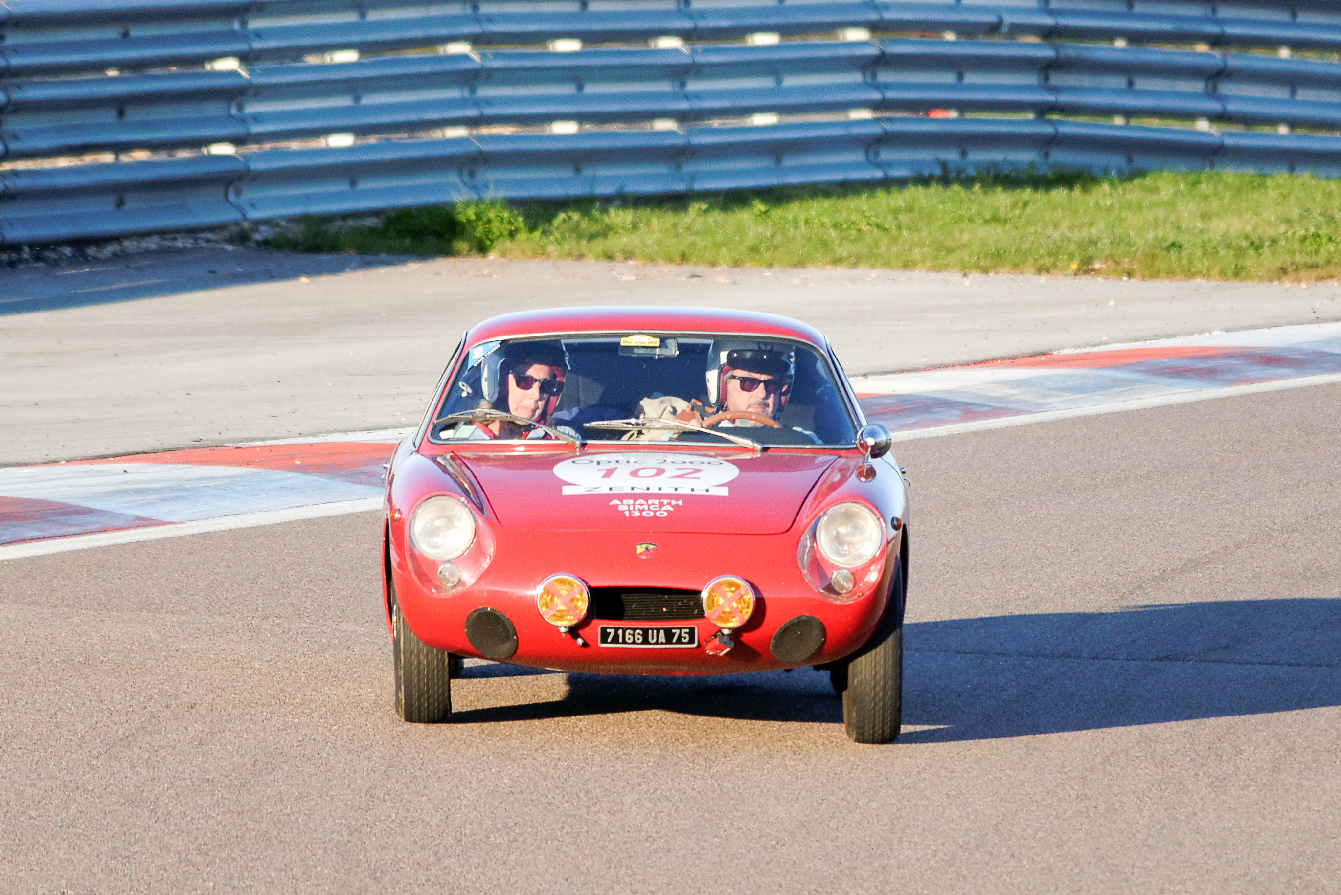 Abarth Simca 1300 GT 1963 - Tour Auto Optic 2000, année 2016 - Étape sur le circuit de Dijon-Prenois (Côte d'Or, Bourgogne-Franche-Comté, France).